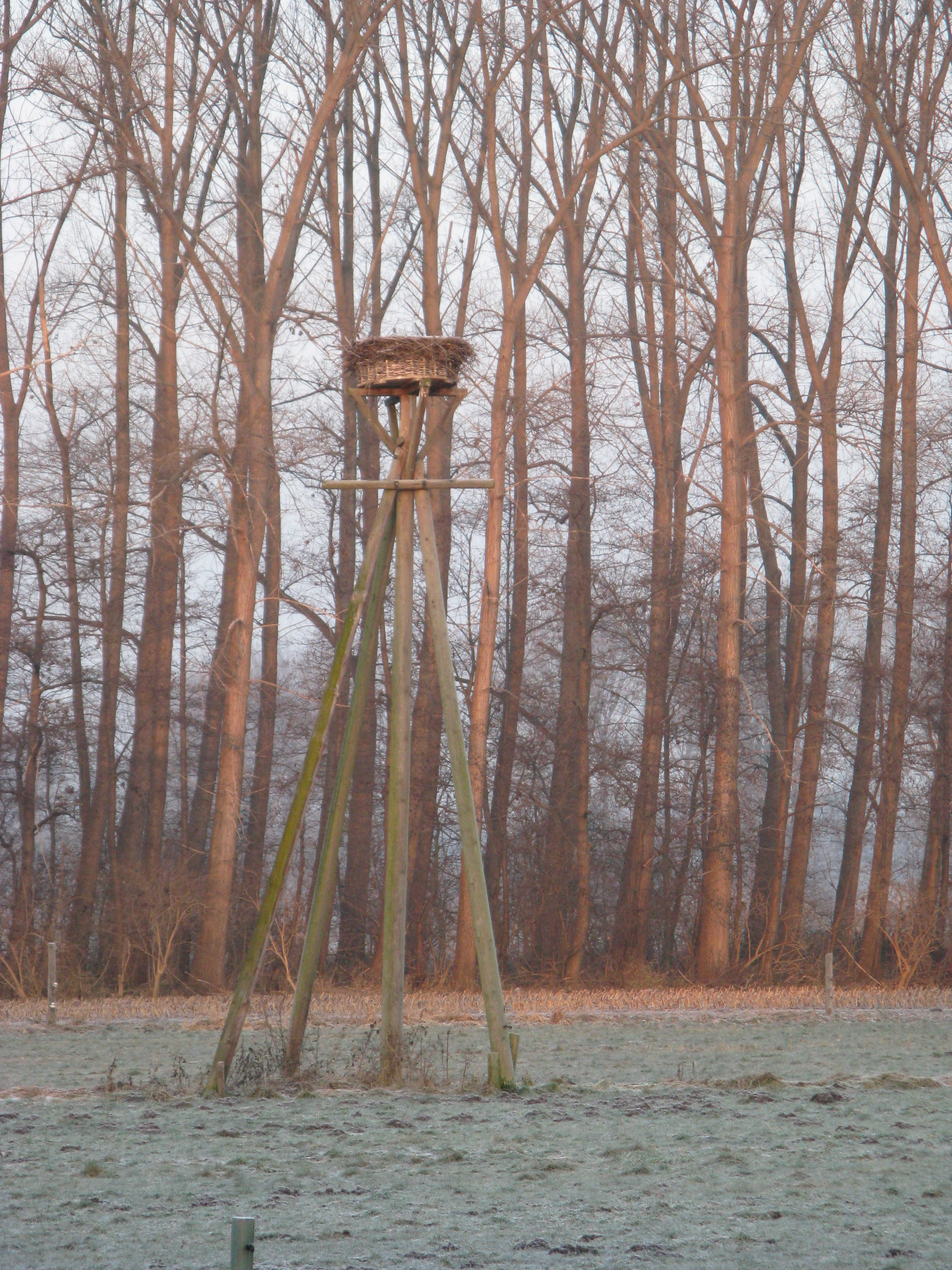 Ein im Winter verlassener Weißstorchenhorst im Naturschutzgebiet Bastauwiesen im Kreis Minden-Lübbecke, Nordrhein-Westfalen. Der gefährdete Weißstorch brütet im Kreis Minden-Lübbecke und stellt das einzige größere Vorkommen dieser Tiere im Land Nordrhein-Westfalen dar.